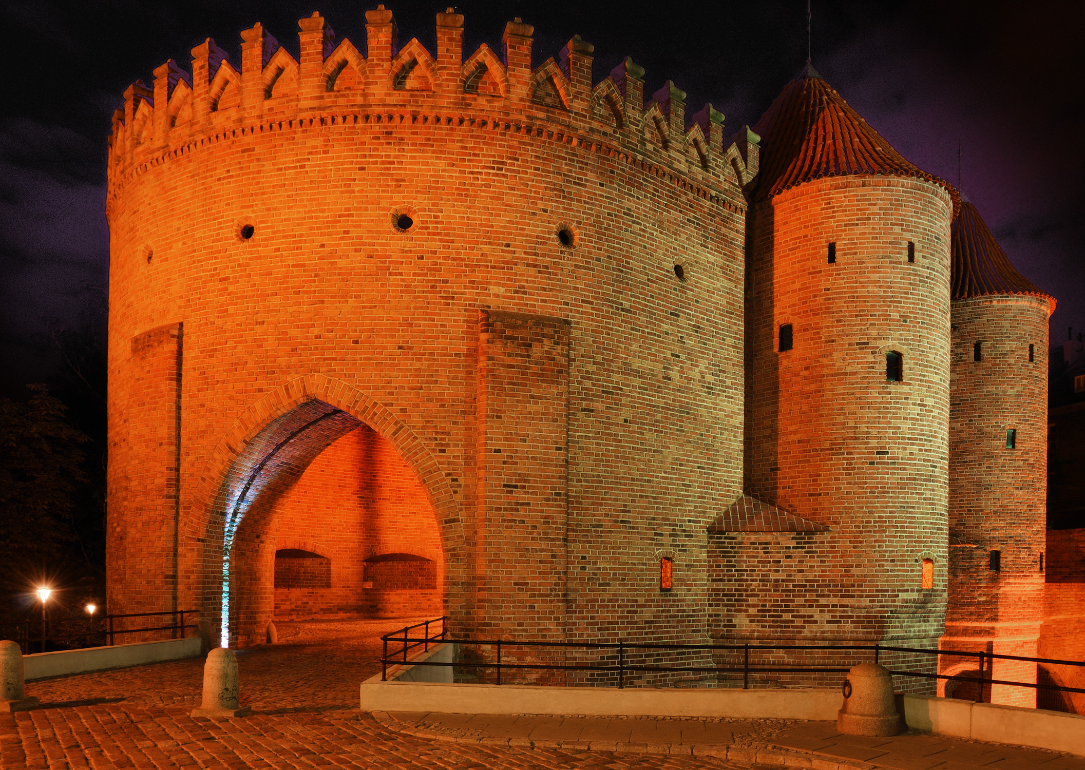 Barbakan w Warszawie